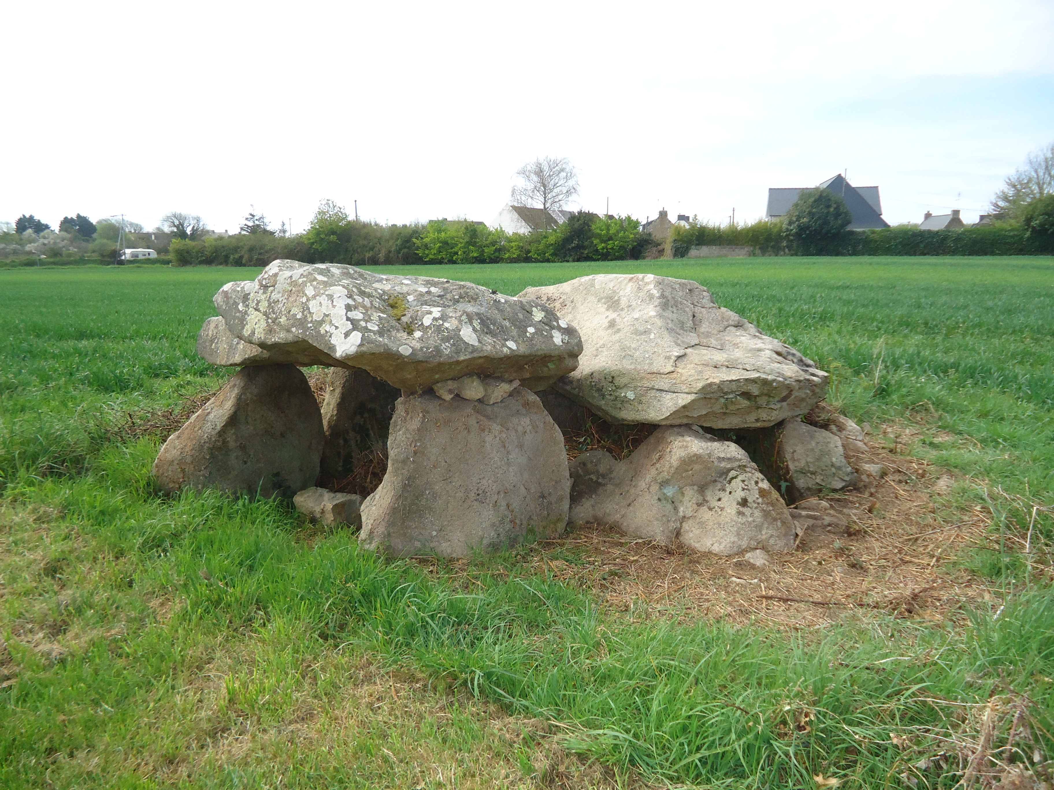 Dolmen de Kerangré à Erdeven dans le Morbihan